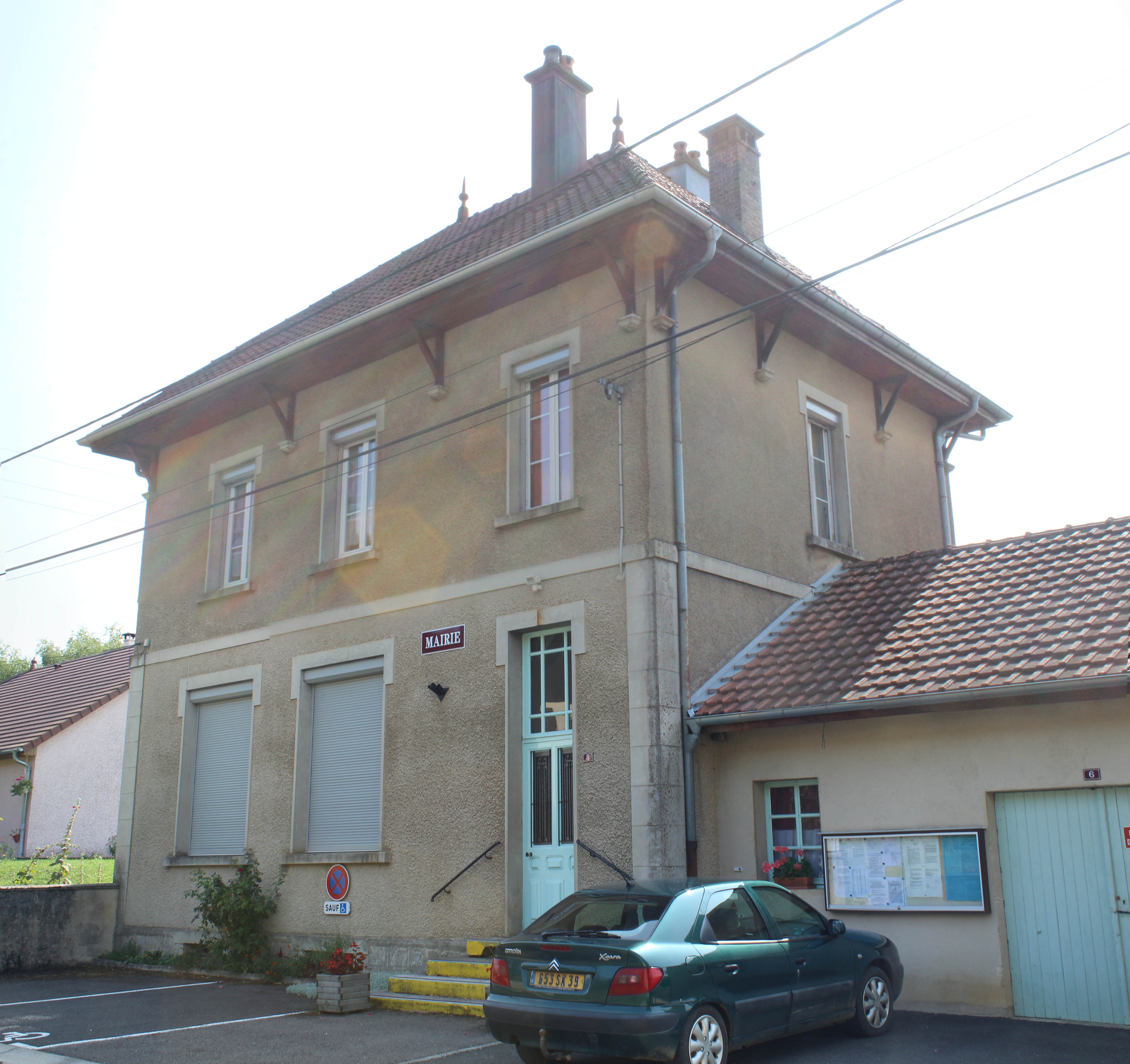 Mairie de Clucy.